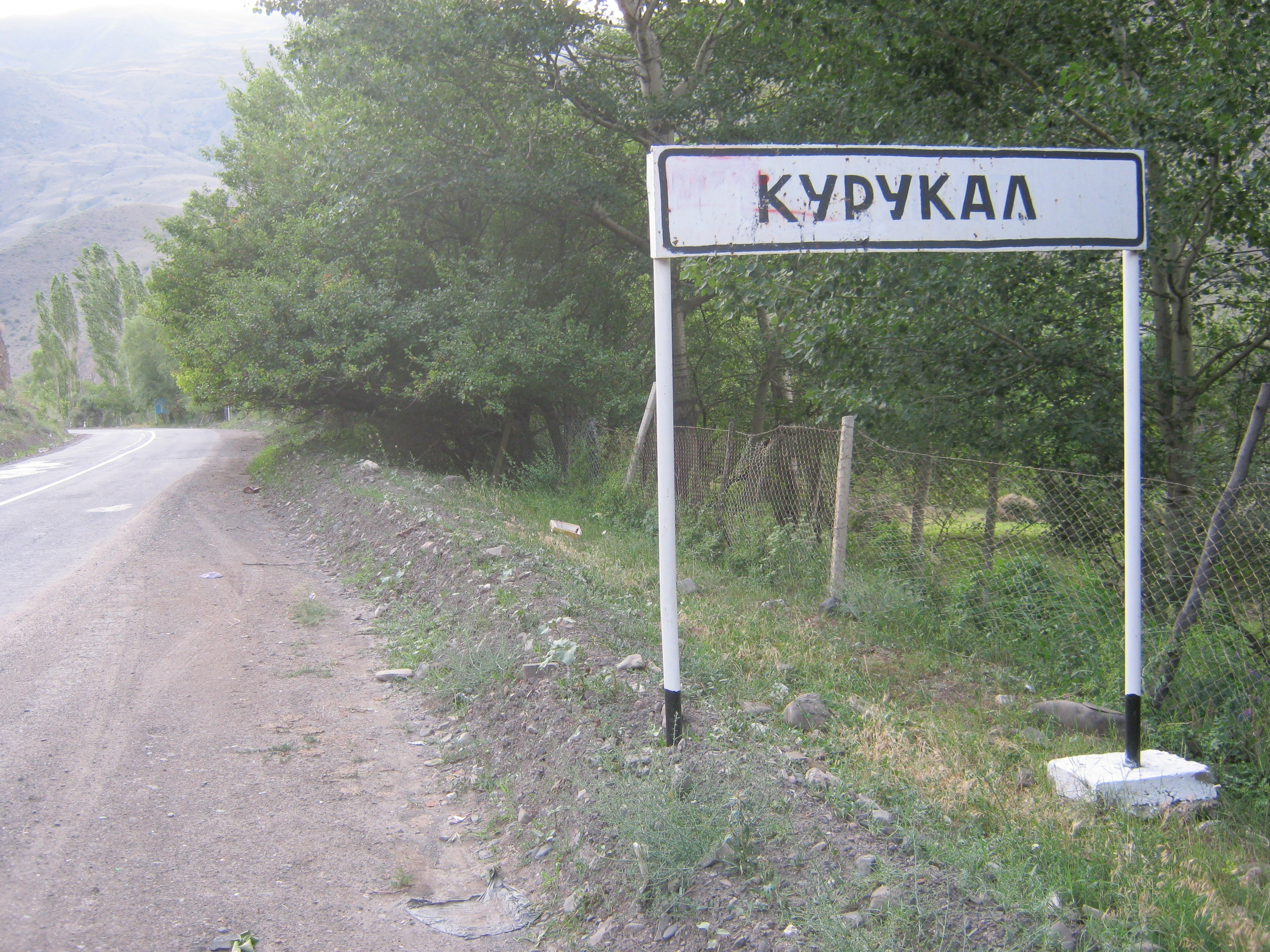 Въезд в село Курукал